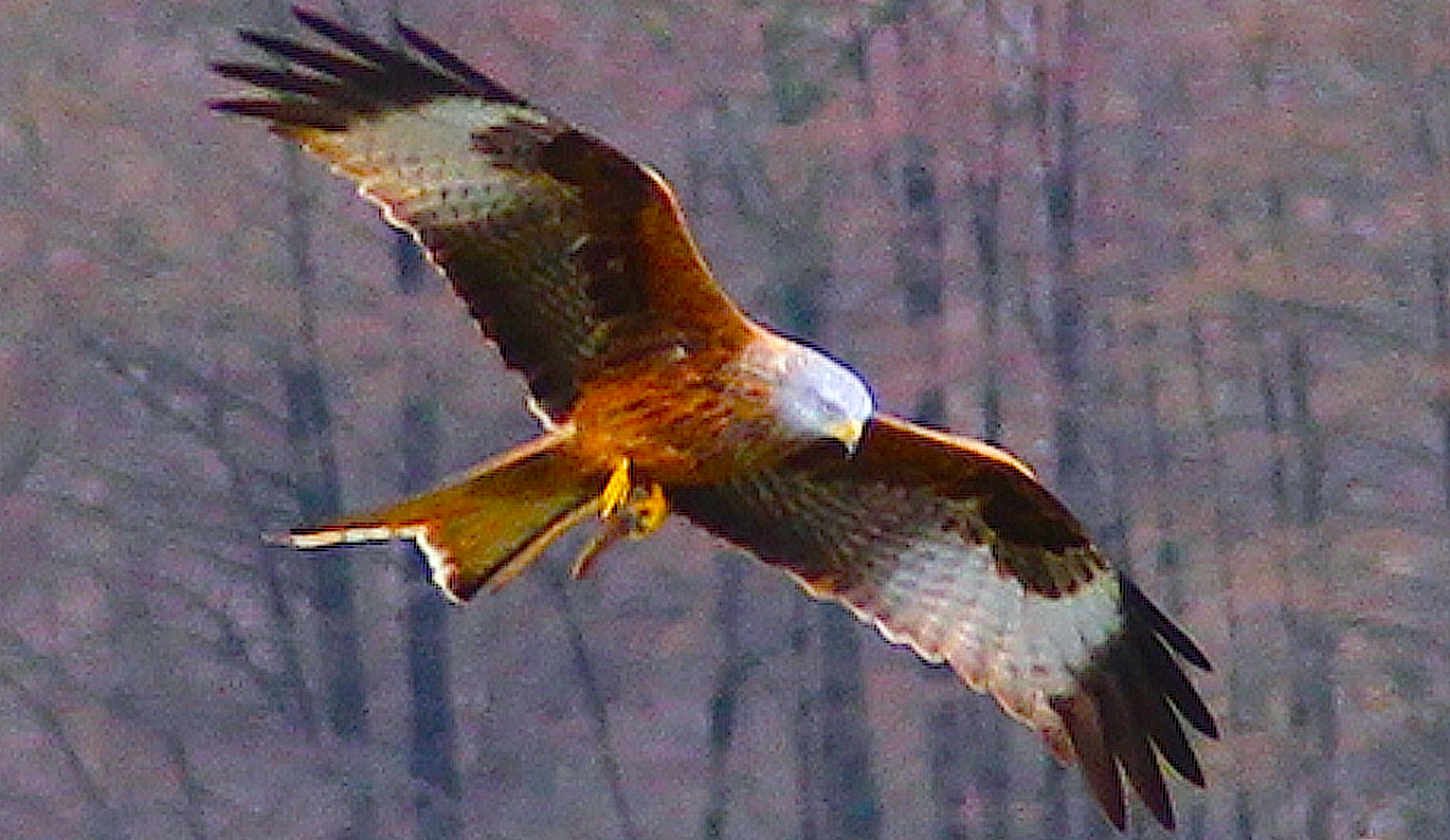 Rotmilan mit Beute in Rückers (Flieden)